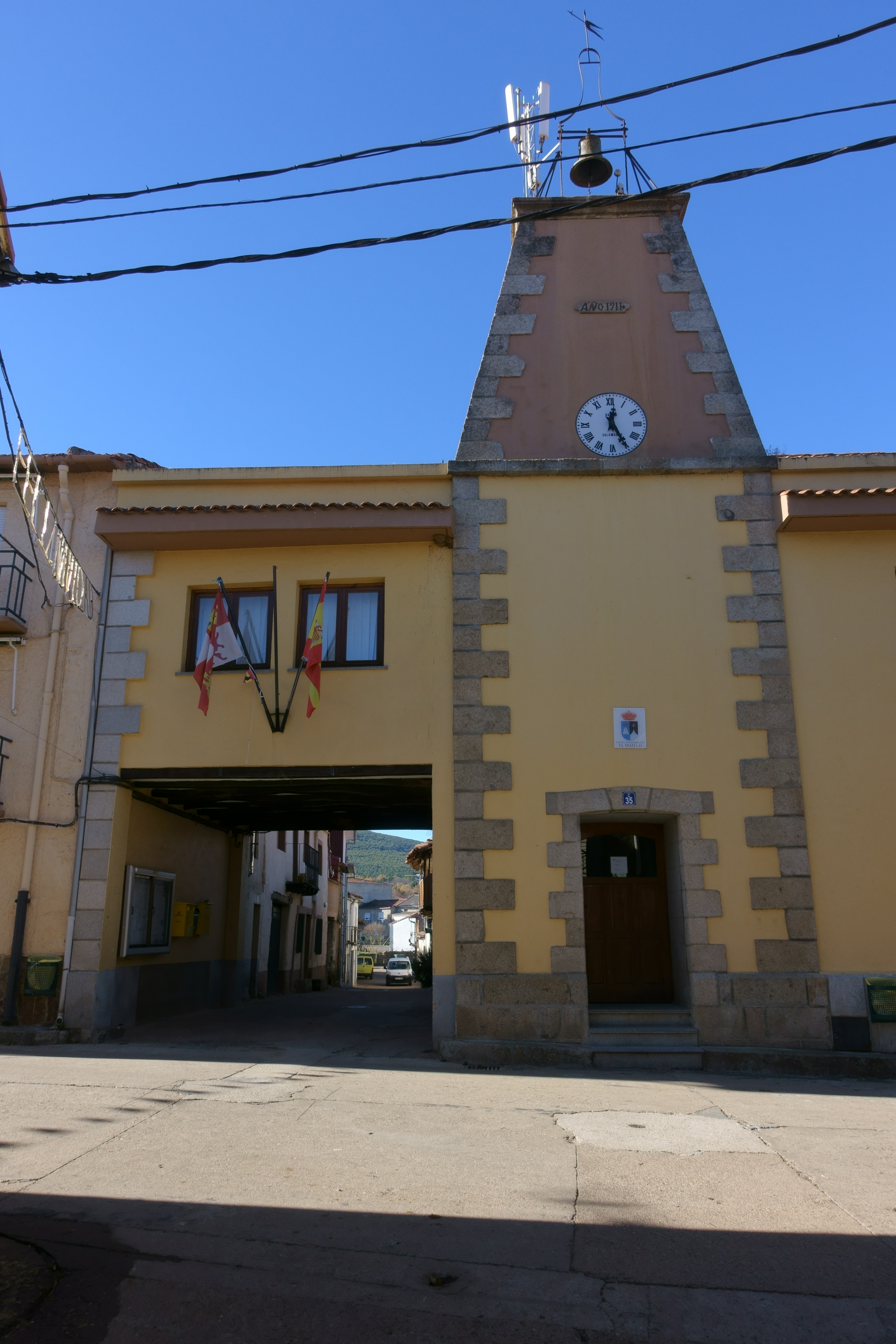 Casa consistorial de El Maíllo (Salamanca, España).